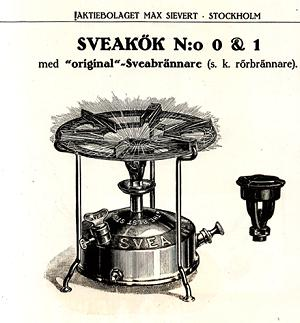 Svea fotogenkök